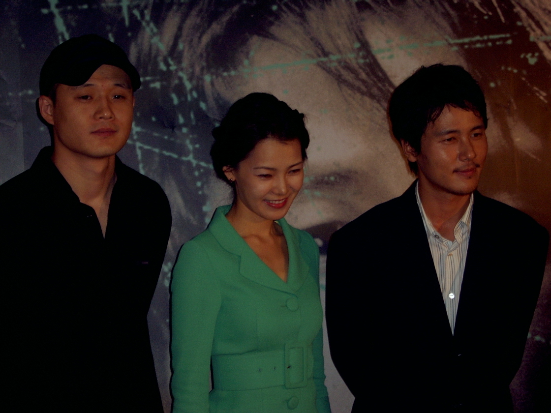 2004년 7월 7일 서울극장에서 열린 영화 《거미숲》 기자시사회에 참석한 송일곤 감독과 배우 서정, 감우성.